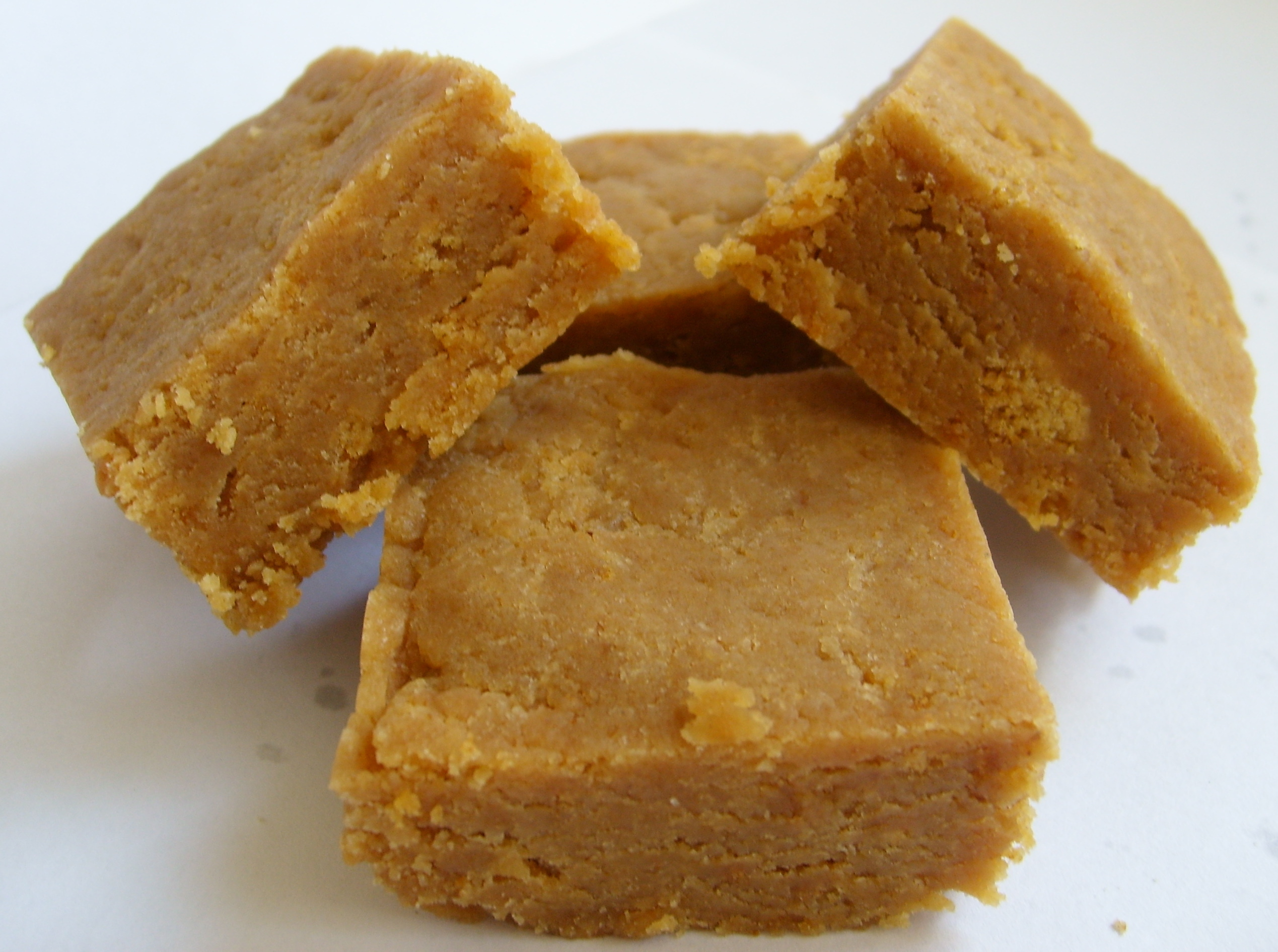 Handmade ginger fudge.